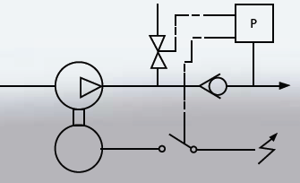 schemat obrazujący metodę regulacji sprężarki wyporowej za pomocą funkcji start / stop